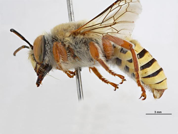 Ctenocolletes tigris male